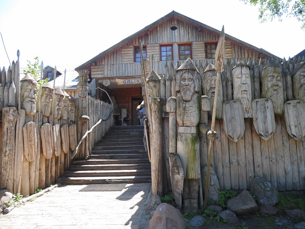 OŚRODEK "GALINDIA".